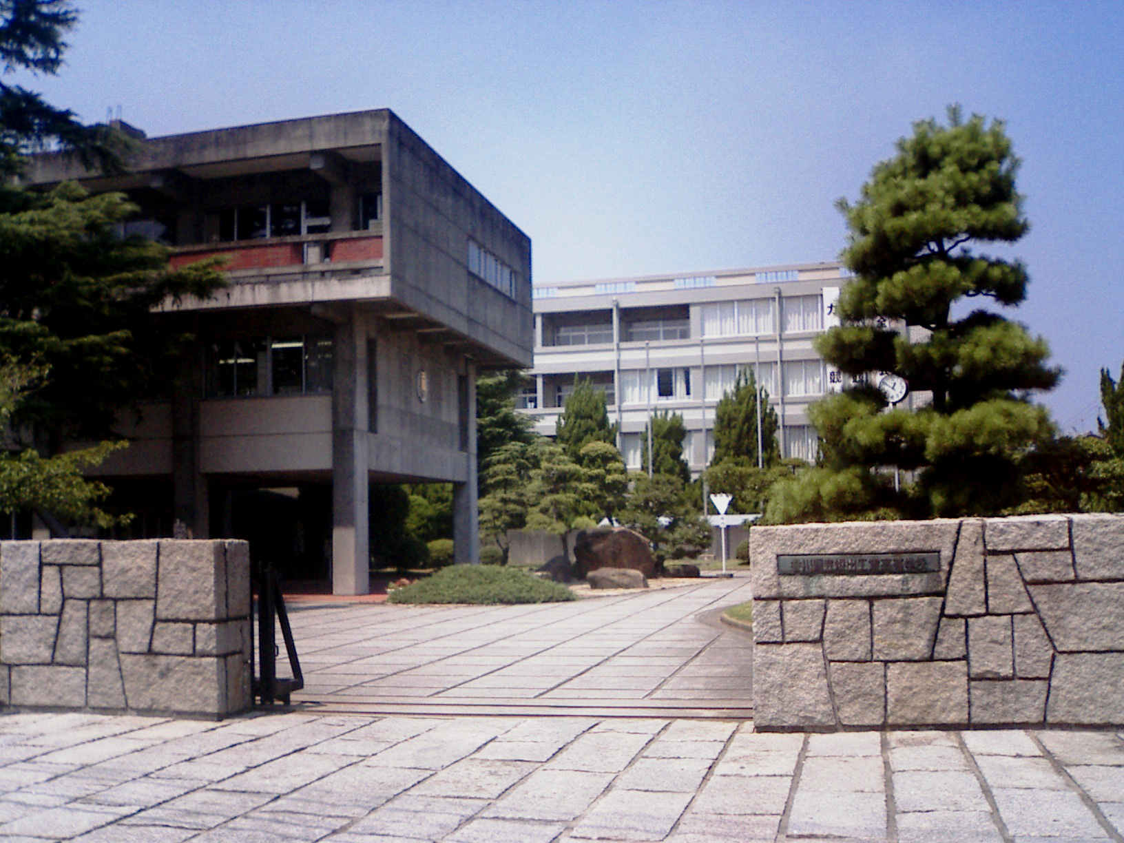 香川県立坂出工業高等学校 - 日本国香川県坂出市にある高等学校。